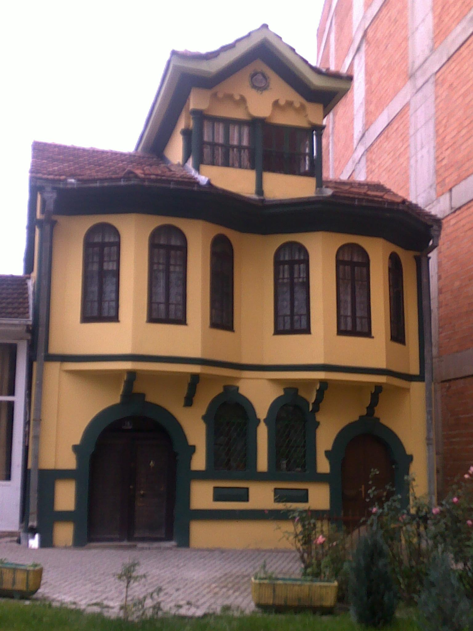 Фотографија од Жолтата Куќа-најстарата куќа бо Гостивар